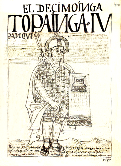 Illustration from the book El primer nueva corónica y buen gobierno